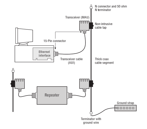 Connection a station to a 10Base5 Ethernet system